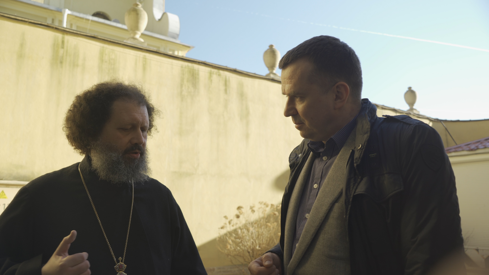 Внук Н. В. Баранова — настоятель Петропавловского собора в Санкт-Петербурге, архимандрит Александр (Федоров) и внук А. И. Наумова — юрист Виктор Наумов. Фото сделано на съемках документального фильма «Архитектура блокады», 2019 год.